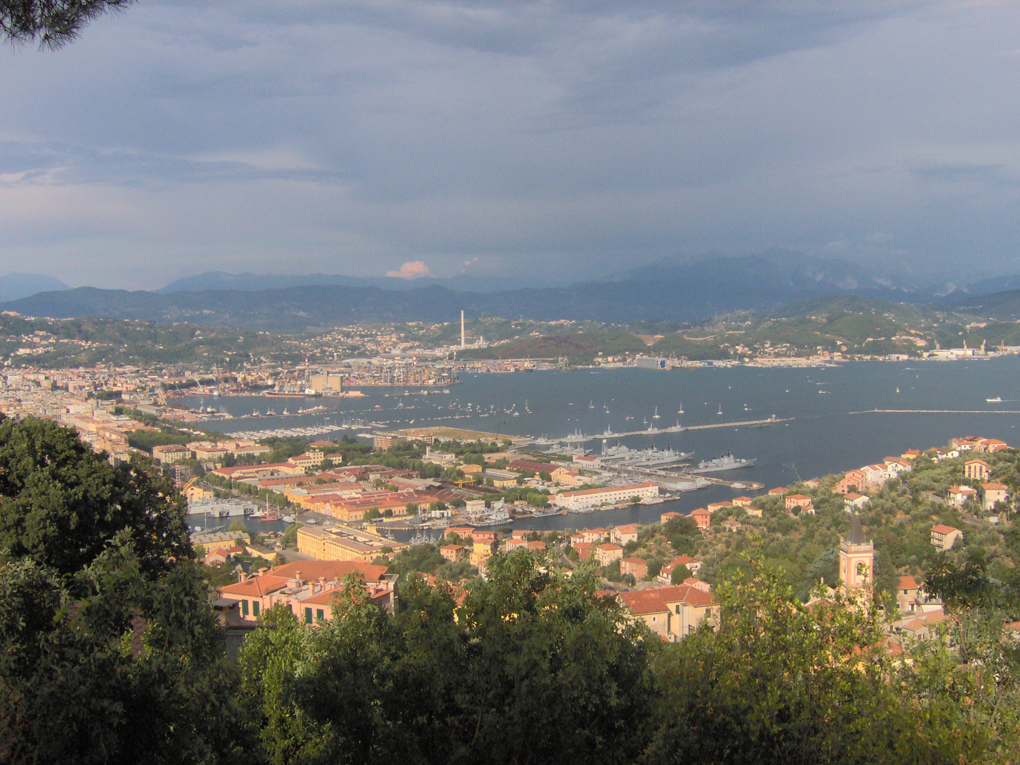 Veduta del golfo con in primo piano l'arsenale militare della marina